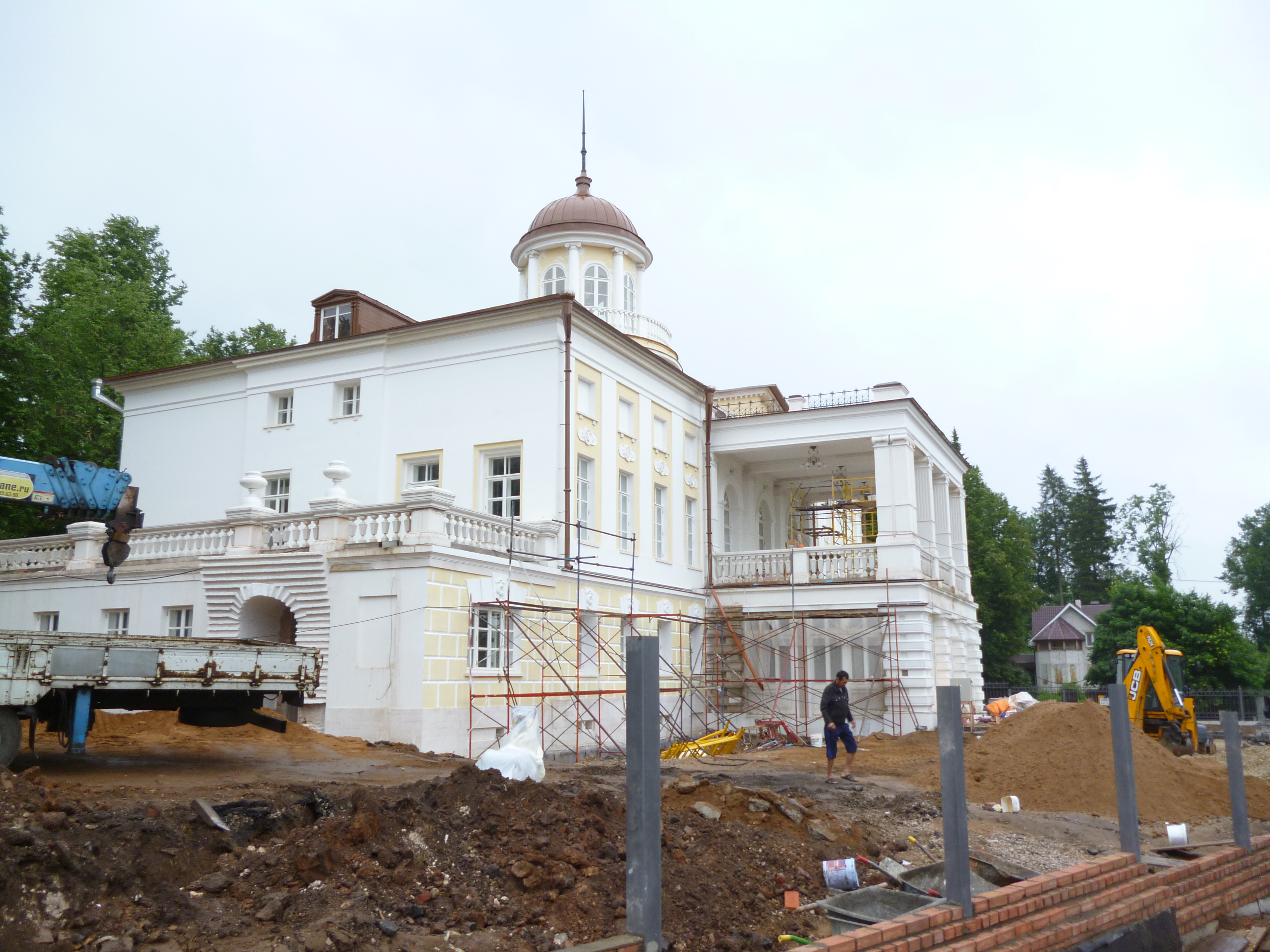 Усадьба Ртищева XVIII века, где в 1928 году прошёл Шестой съезд Коммунистической партии Китая.